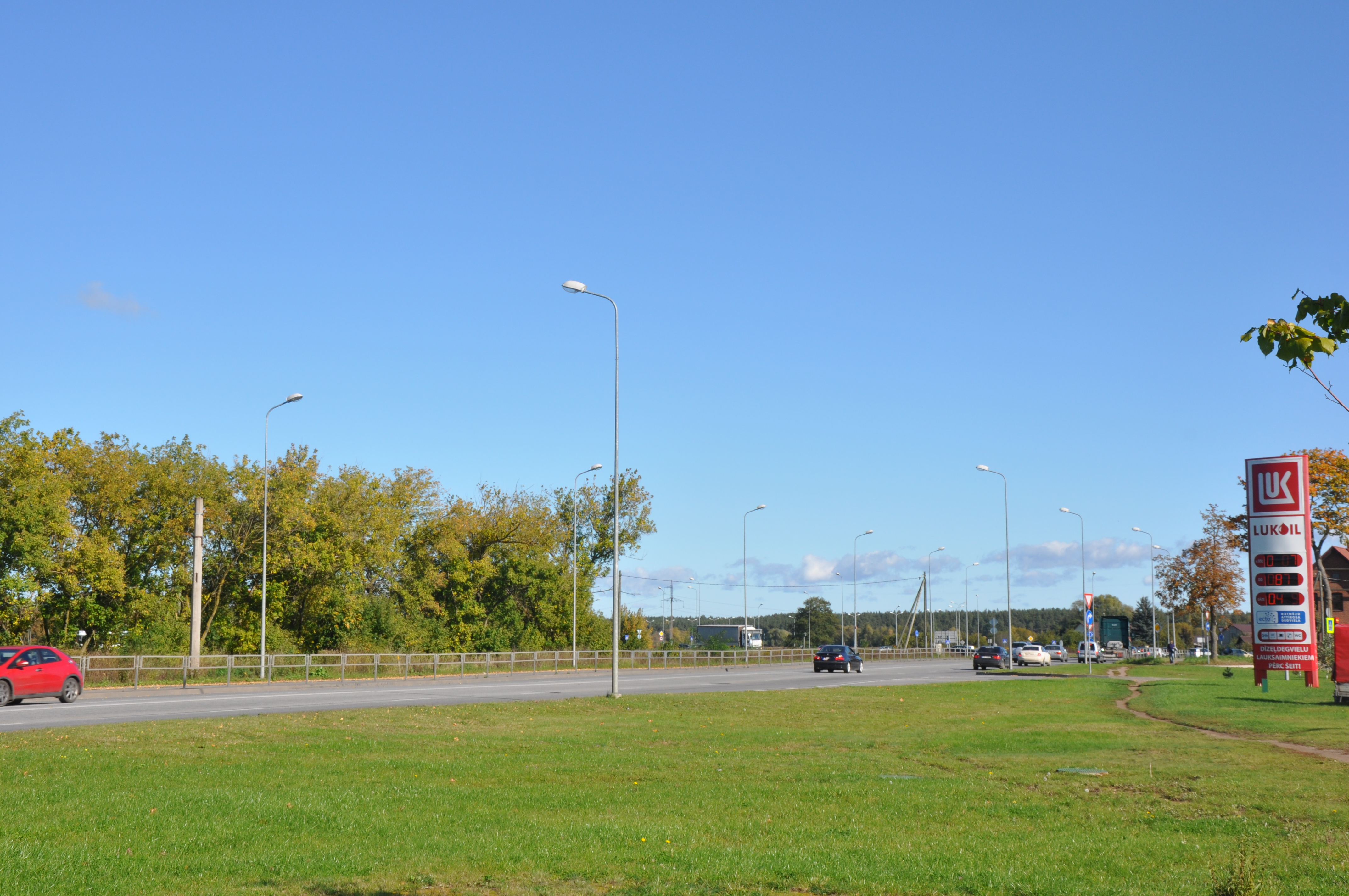 Lubānas iela, Dreiliņi, Stopiņu pagasts, Stopiņu novads, Latvia